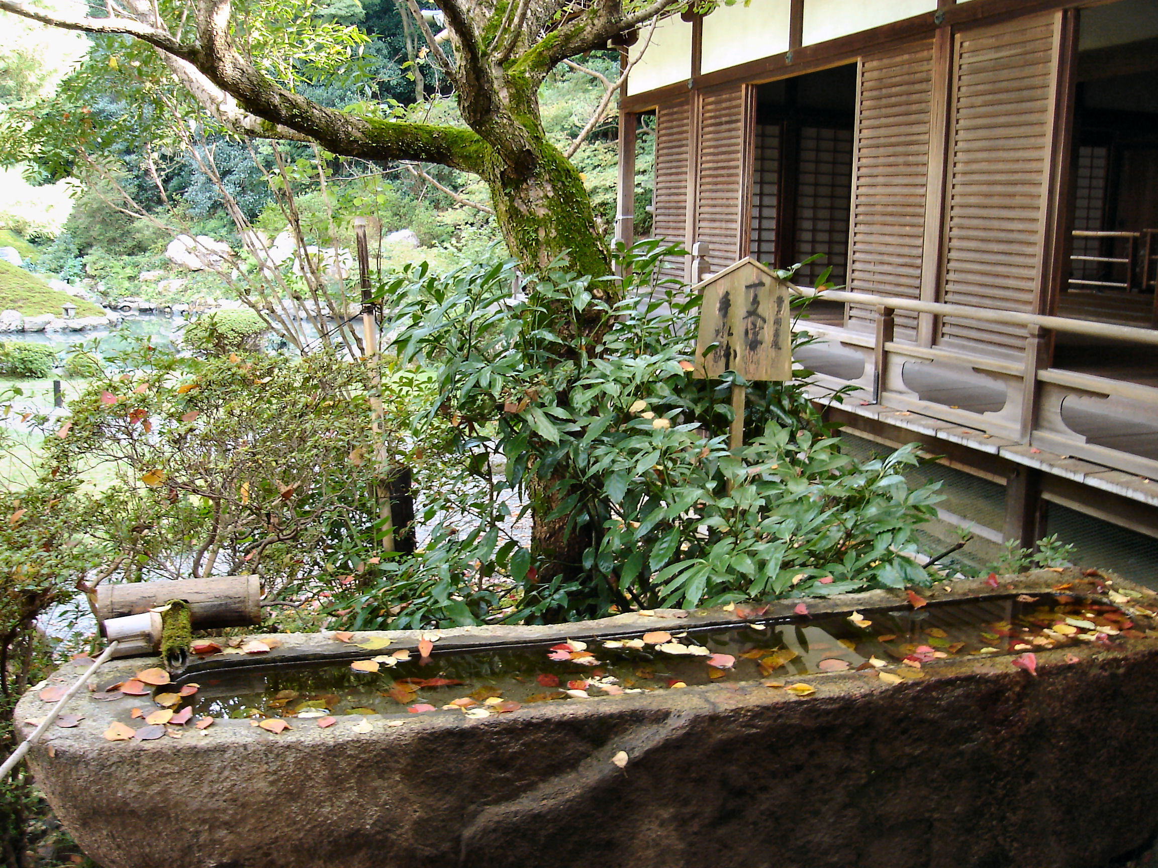 Syorenin IchimonjiChozubachi